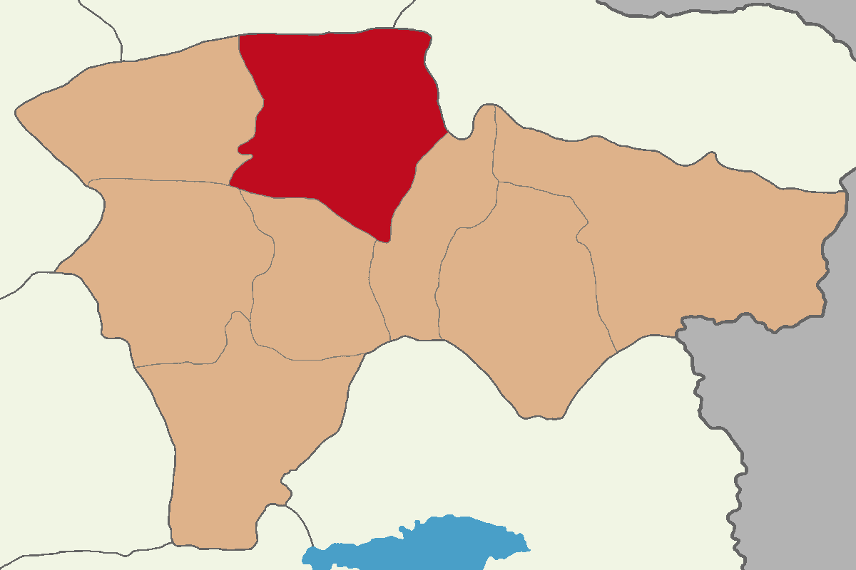 Ağrı Merkez ilçesinin konumu